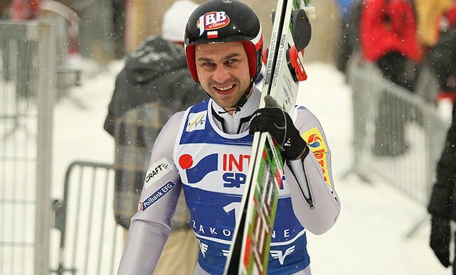 Marcin Bachleda - polski skoczek narciarski podczas Pucharu Świata w skokach narciarskich Zakopane 2012.